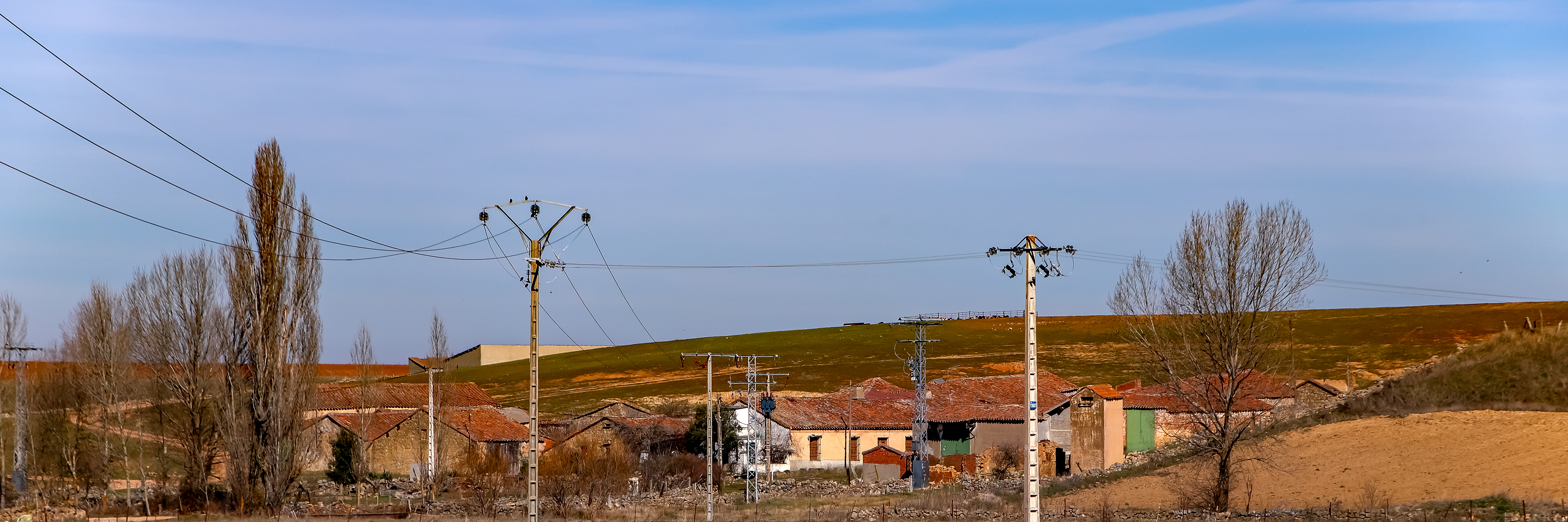 Santo Tomé de Colledo es un despoblado que pertenece al municipio de Galindo y Perahuy, comarca Campo de Salamanca, provincia de Salamanca.